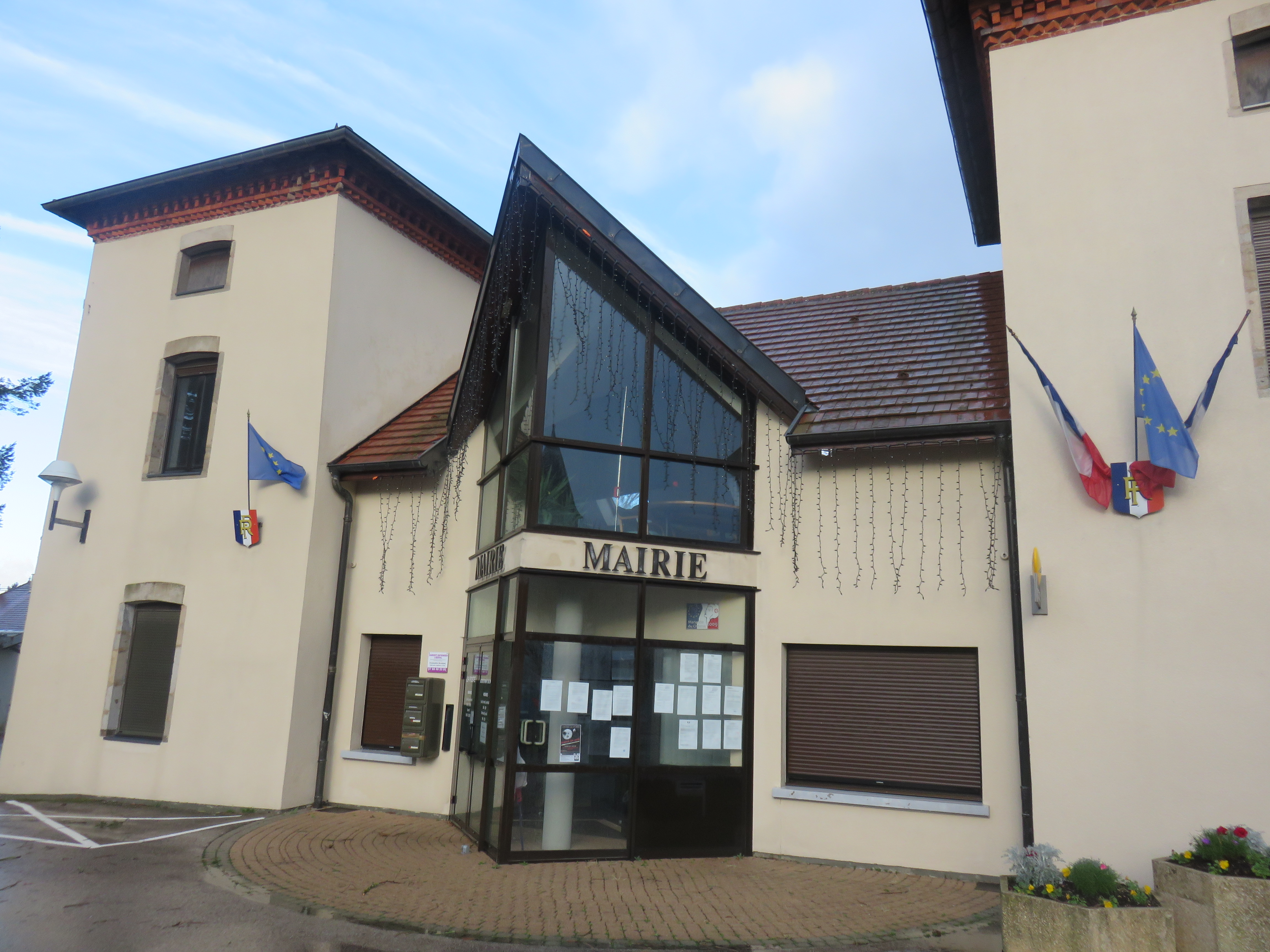 Dampierre (Jura, France) en janvier 2018.